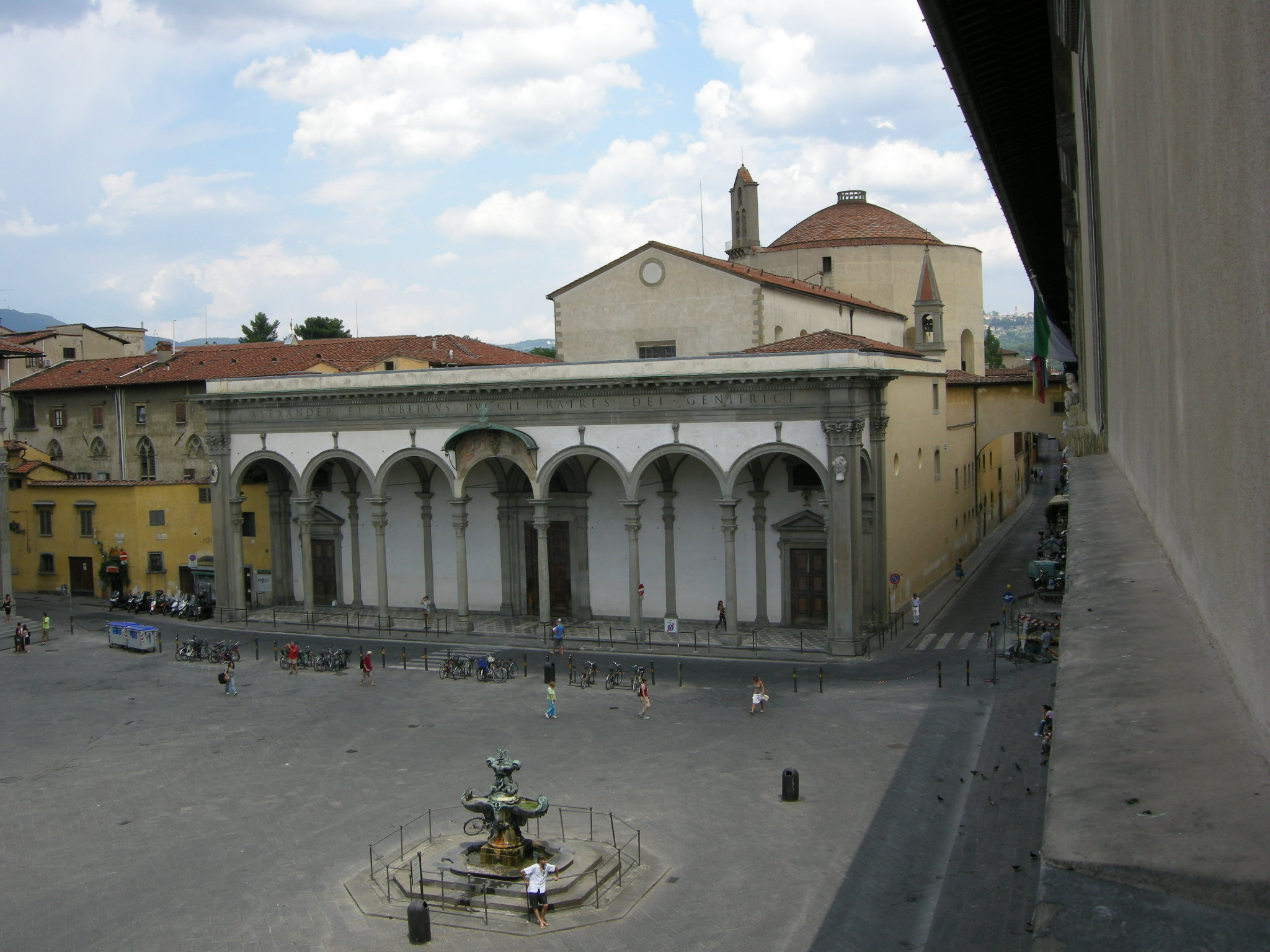 Santissimia annunziata, firenze